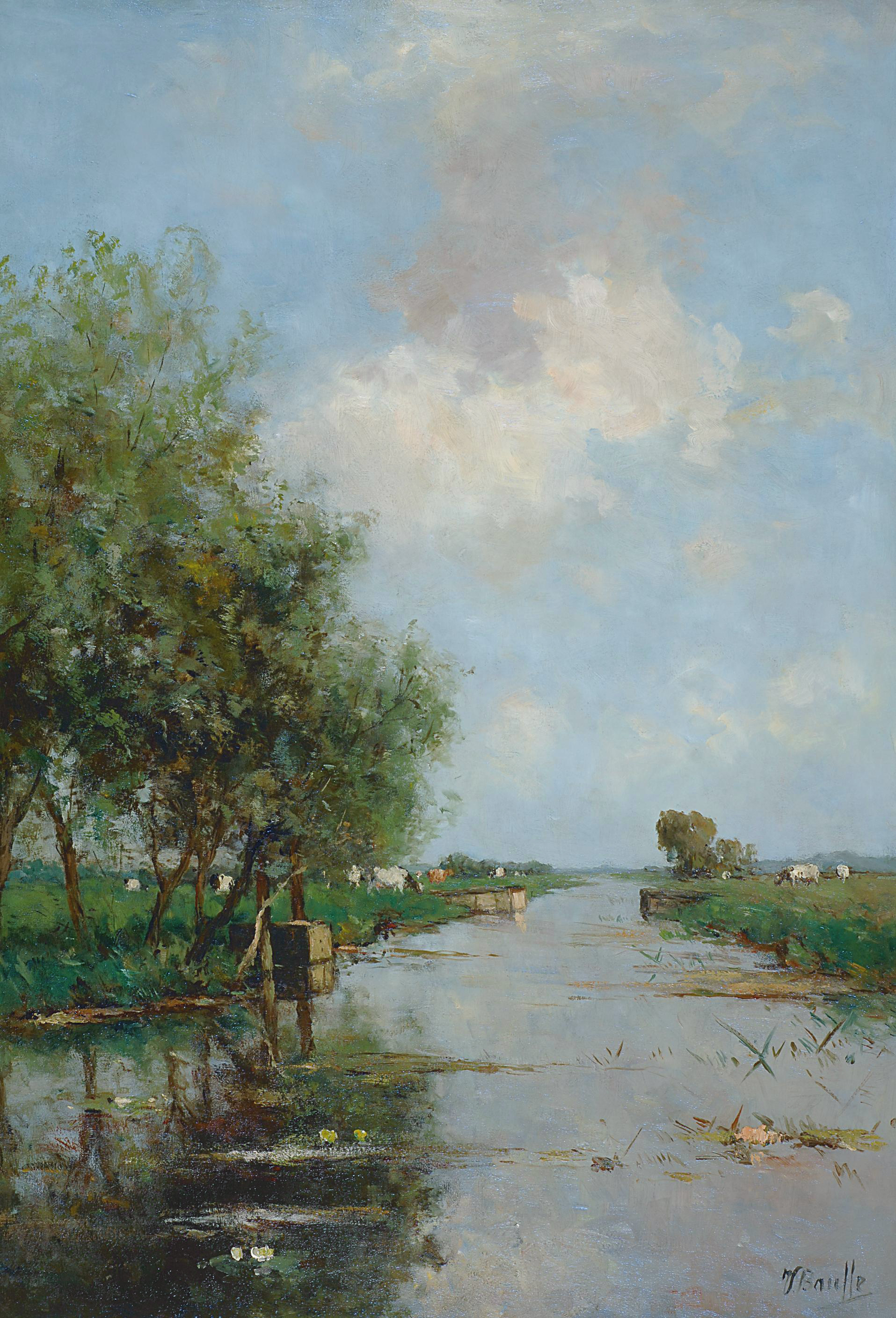 Koeien in een zomers polderlandschap oil on canvas 101 x 71 cm signed b.r.: V. Baufe